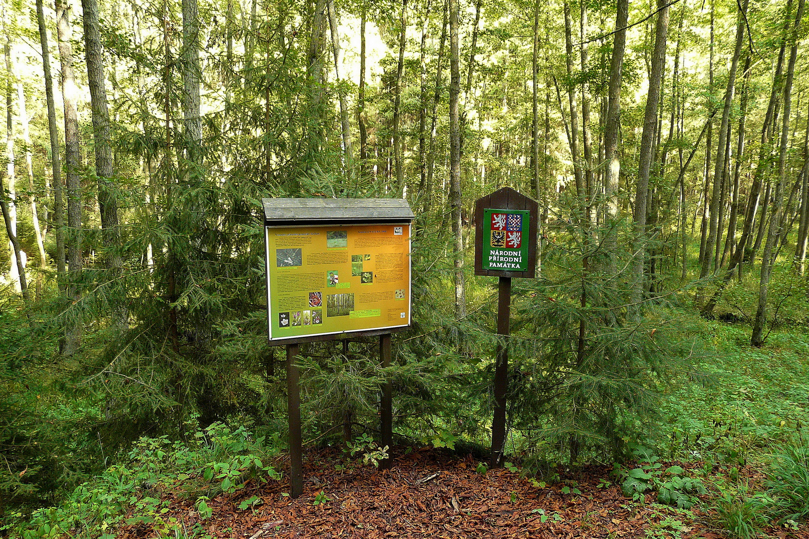 NPP Rečkov